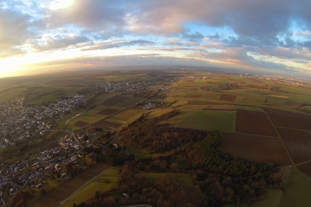 170m über Niederneisen